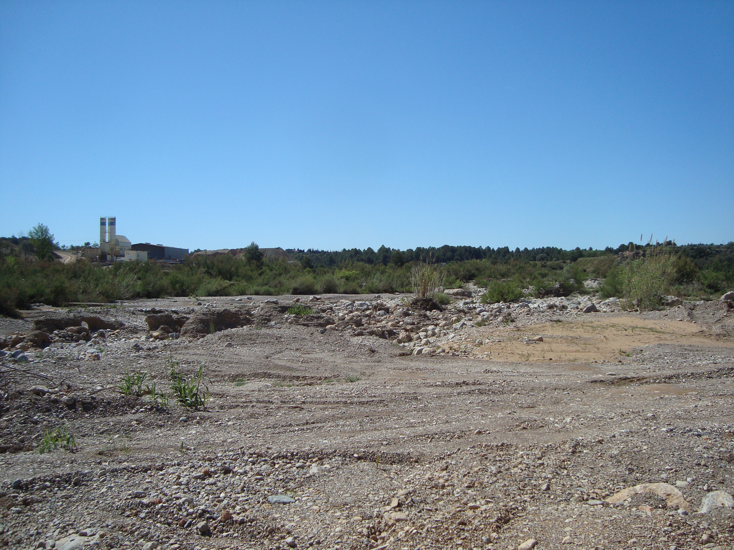 Rambla de la Viuda a la altura de Mas de Flors (Sant Joan de Moró)